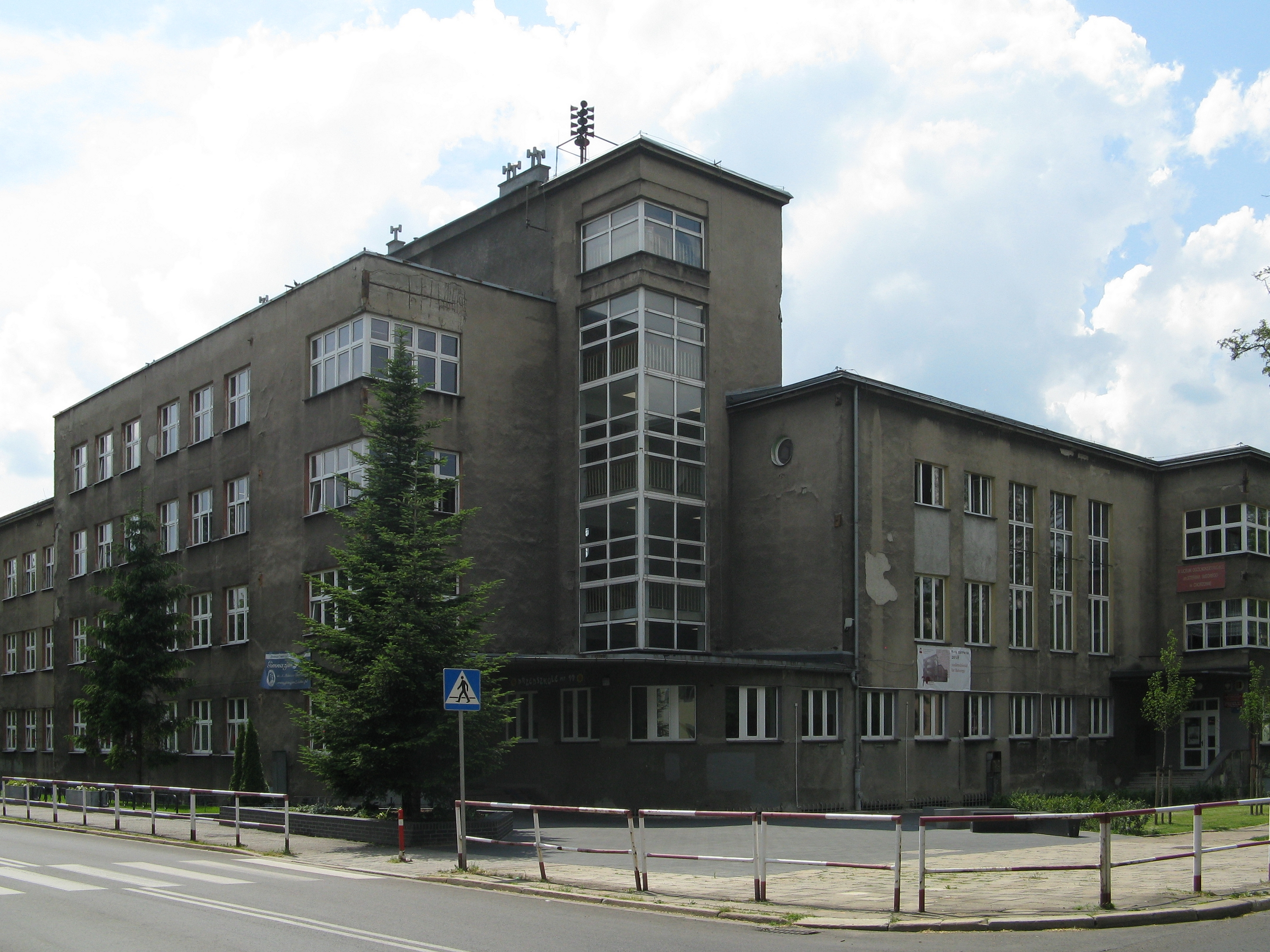 Chorzów, ul. Farna 7, budynek szkoły.